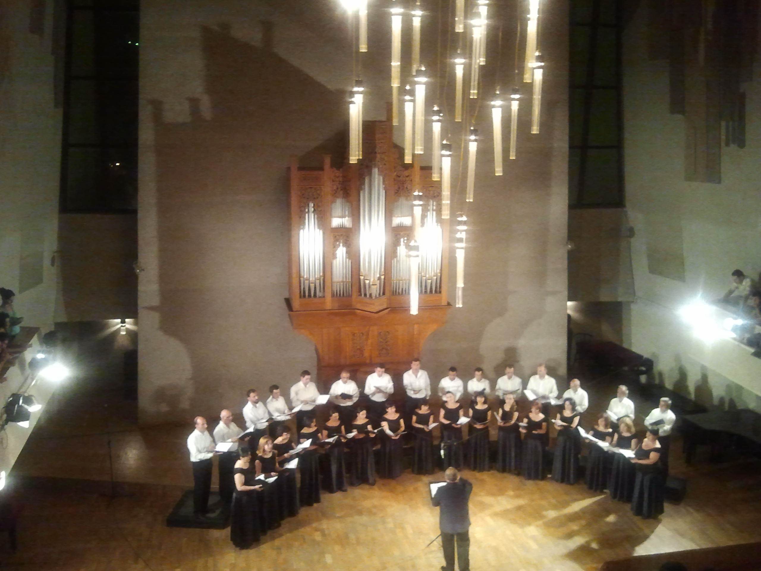 Համերգ Կամեռային երաժշտության տանը 6/91